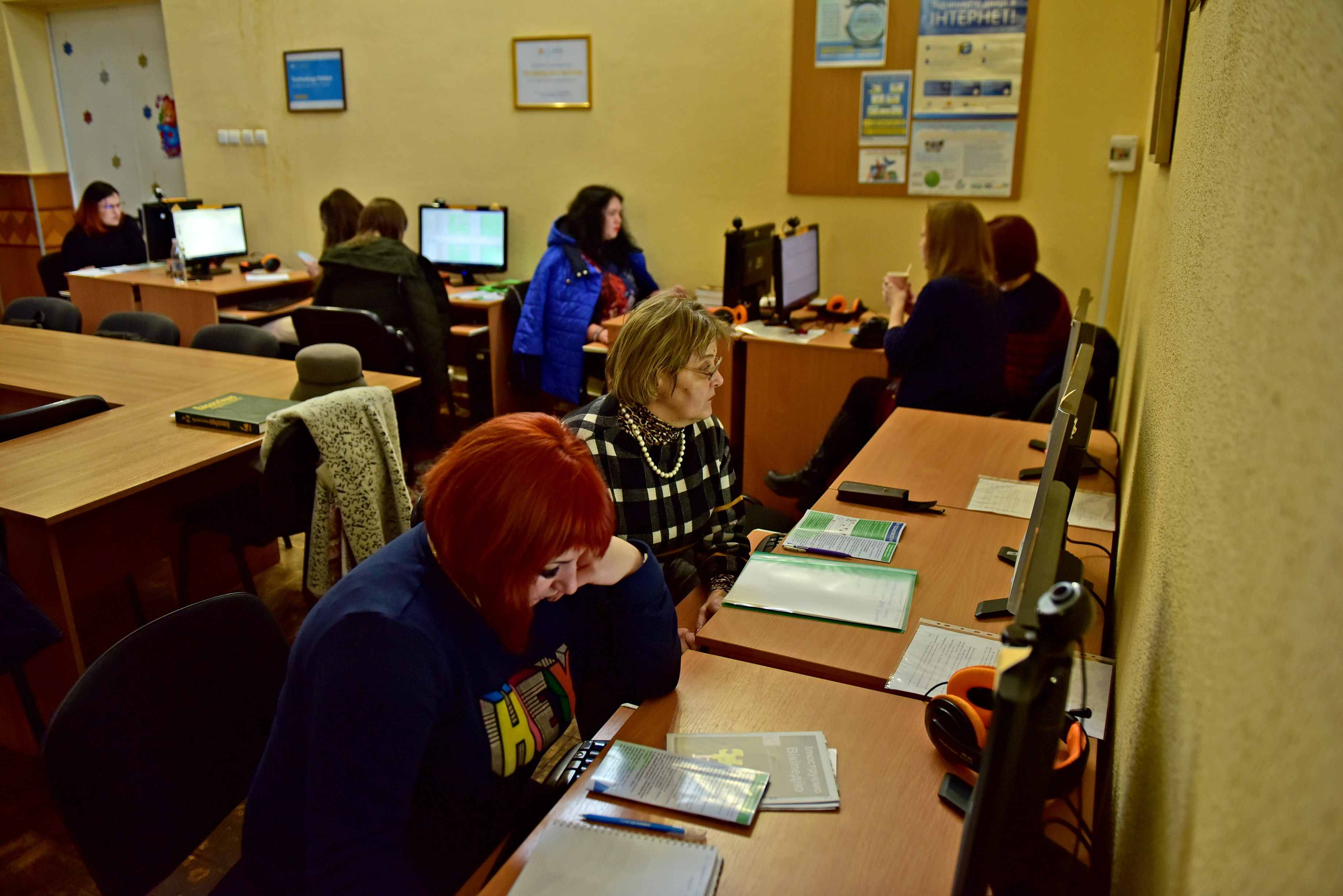 Вікімарафон-2020 в Хмельницькій міській центральній бібліотеці